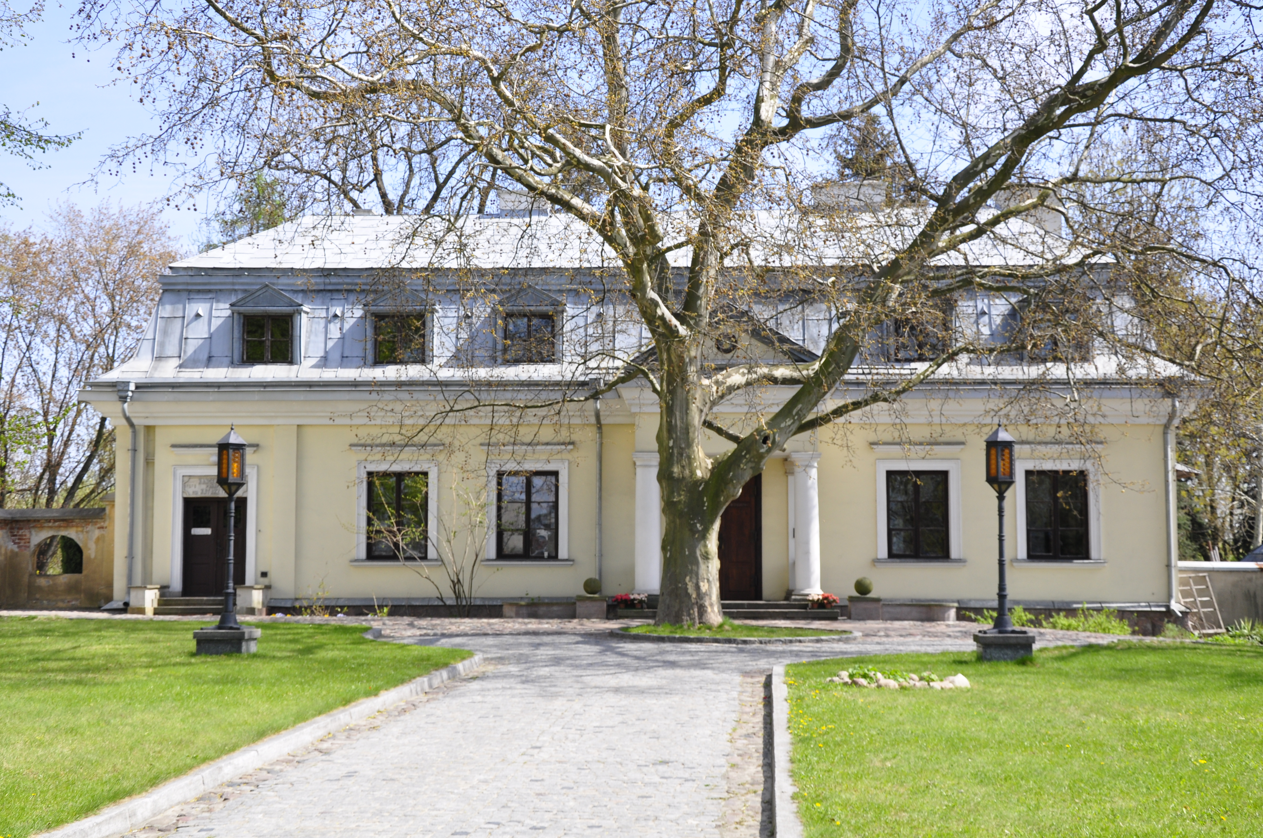 Pfarrei (Plebania), Sw Katarzyna, ul. Fosa 17, Warschau-Ursynow